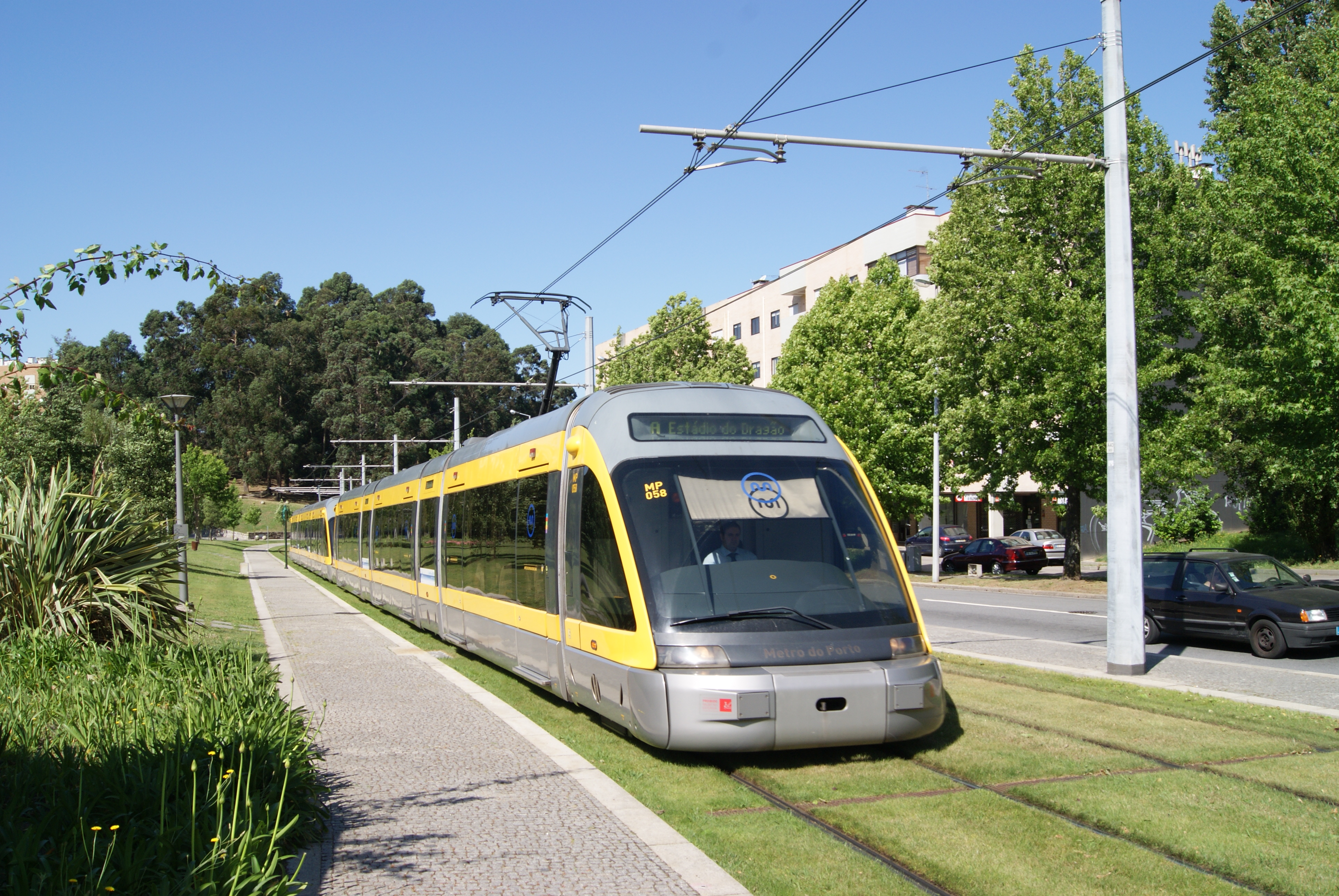 Photo. Trams aux Fils. Pour moi, ce n'est pas un métro, pas un tram et pas un train, mais les trois à la fois.